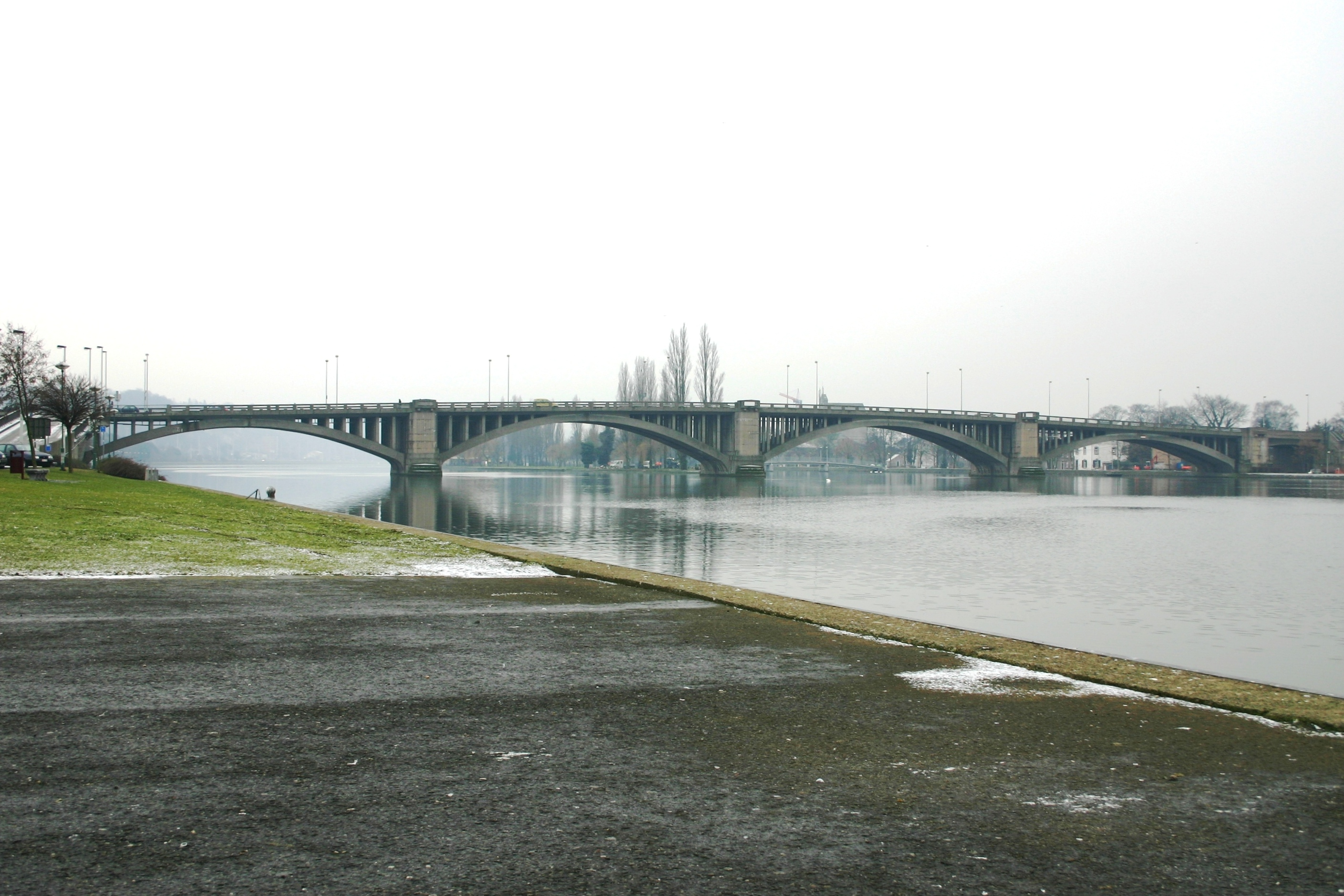 Le pont de Visé en 2005